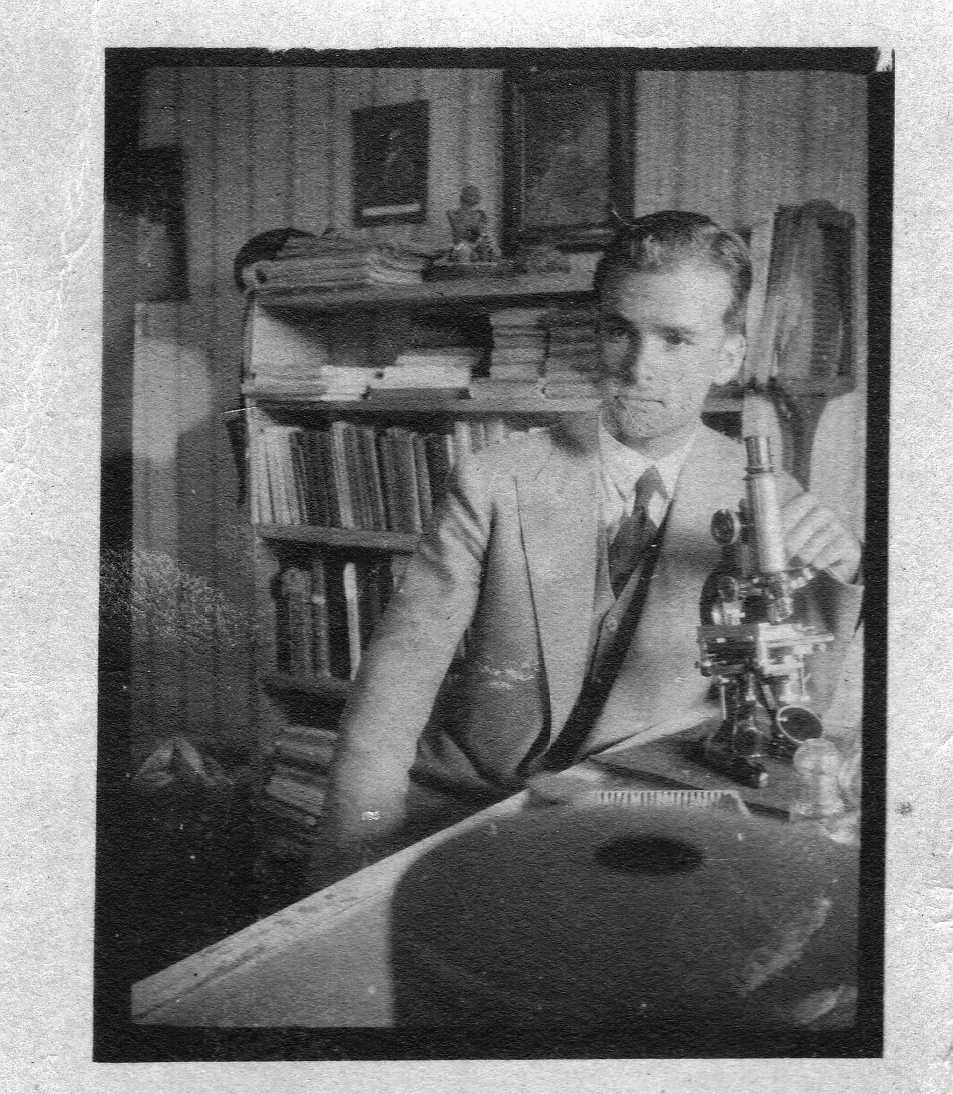 Dr. Jaime Rivadeneira trabajando en su laboratorio, 1930